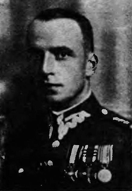 Jan Slaski (por. 16pu)